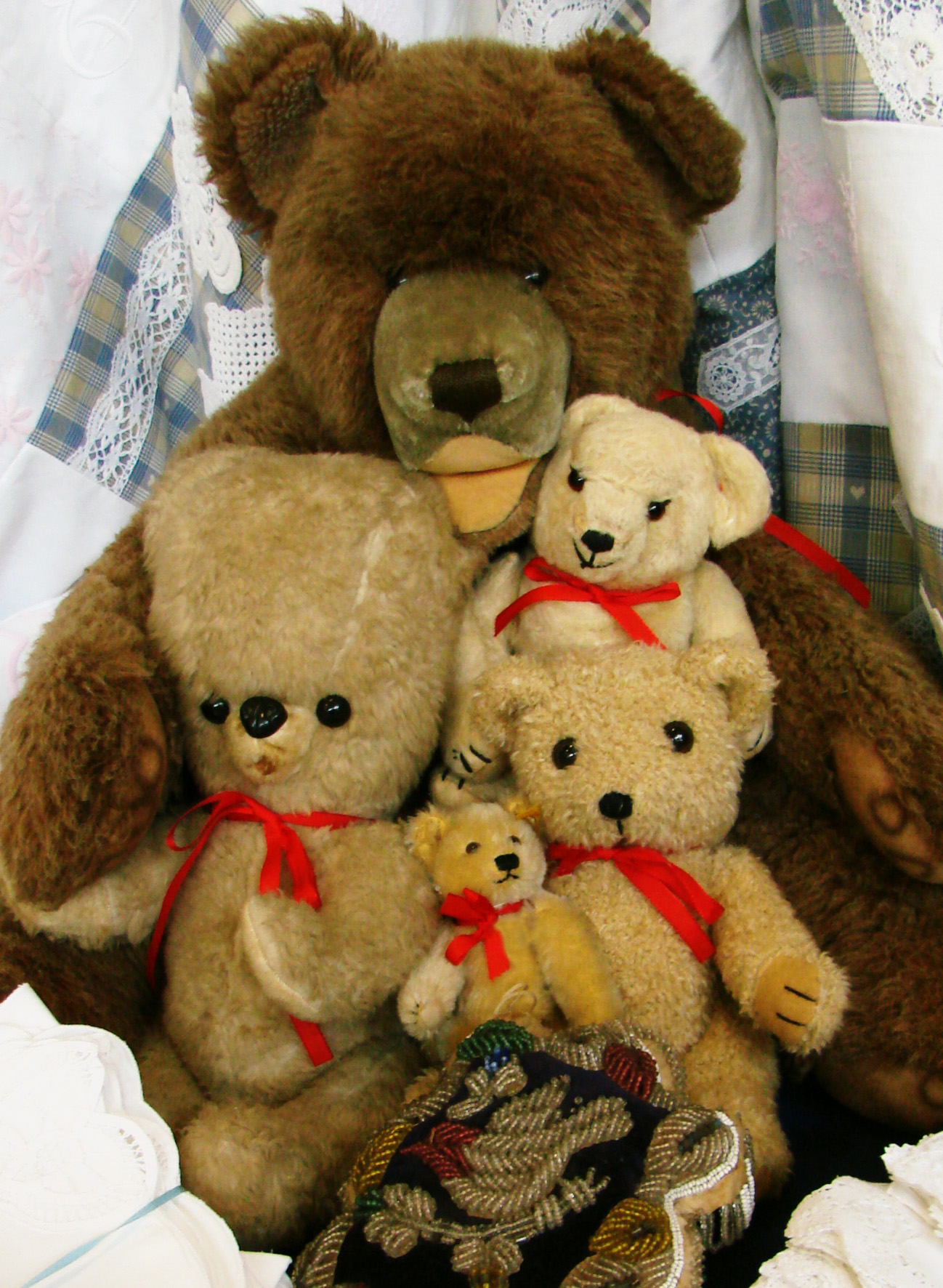 Teddy bears